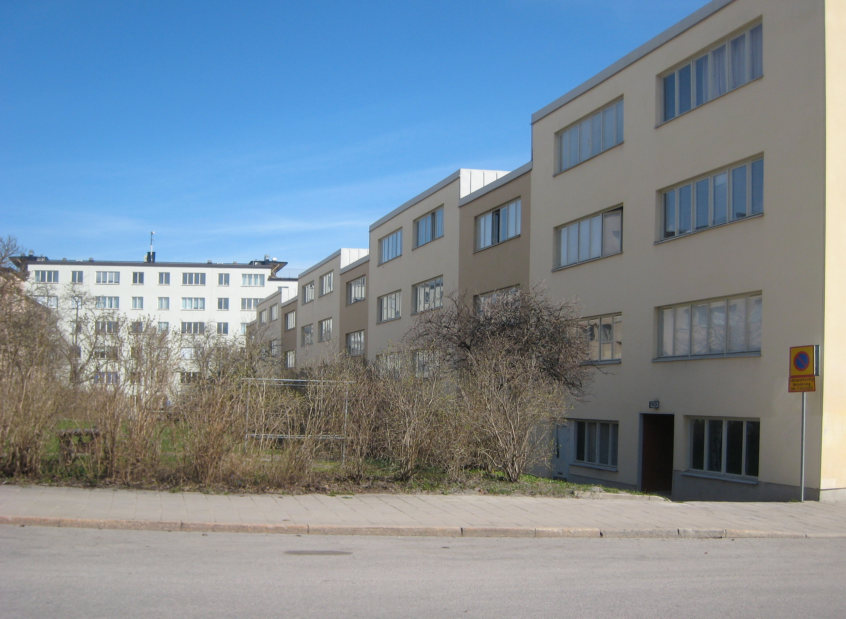 Kvarteret Gräset on Eriksdalsgatan, architect Sven Markelius.